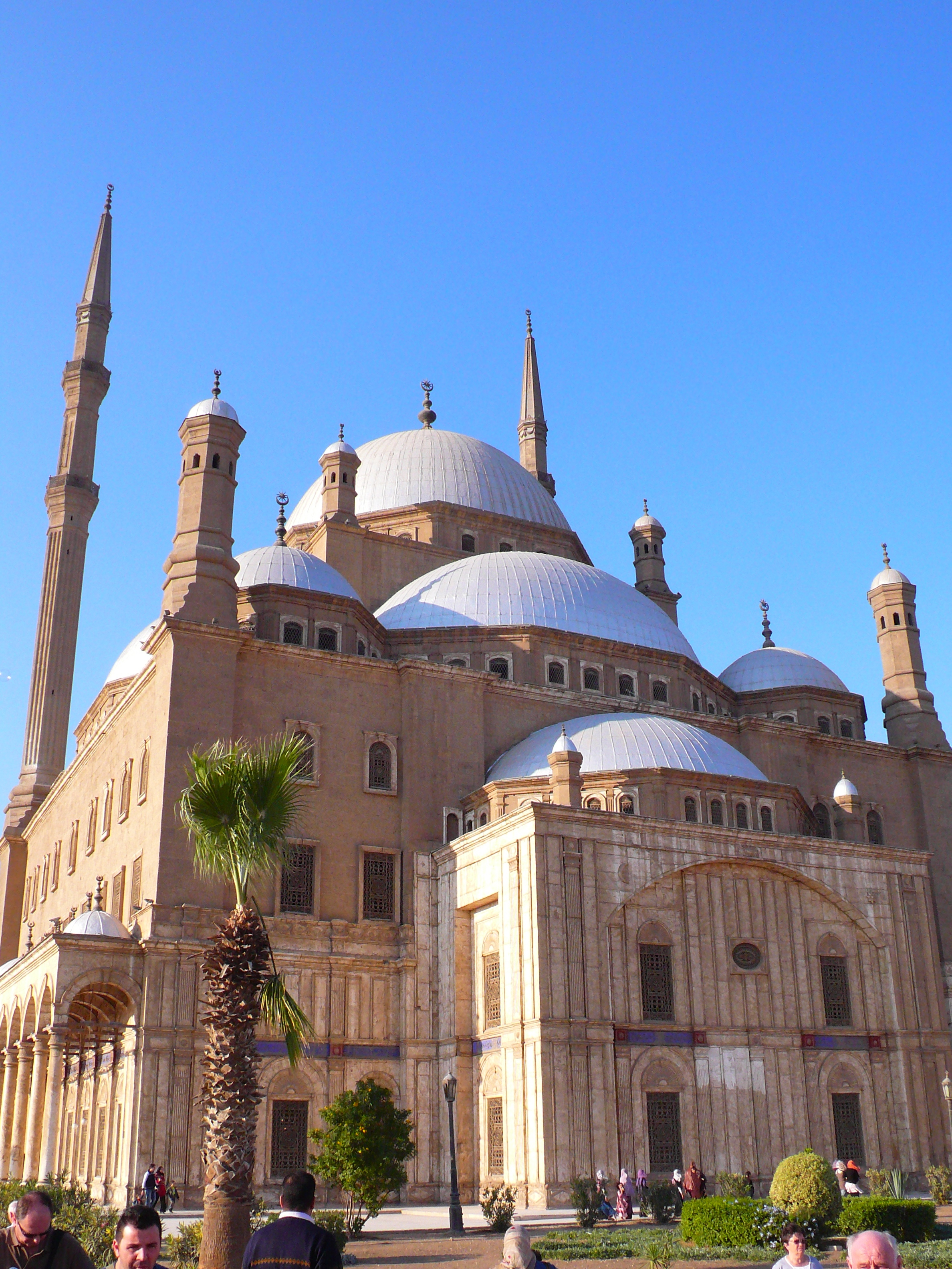 Mohamed Ali Mosque, Cairo